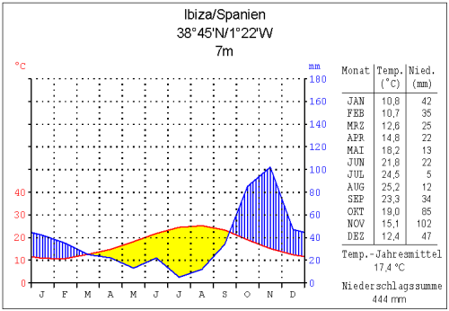 Klimadiagramm Ibiza